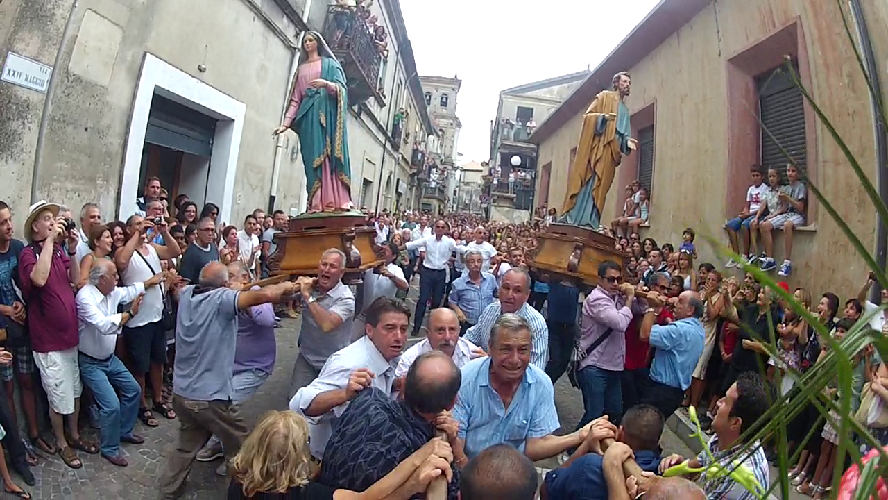 Confronta festa del santo salvatore a Pazzano 2012